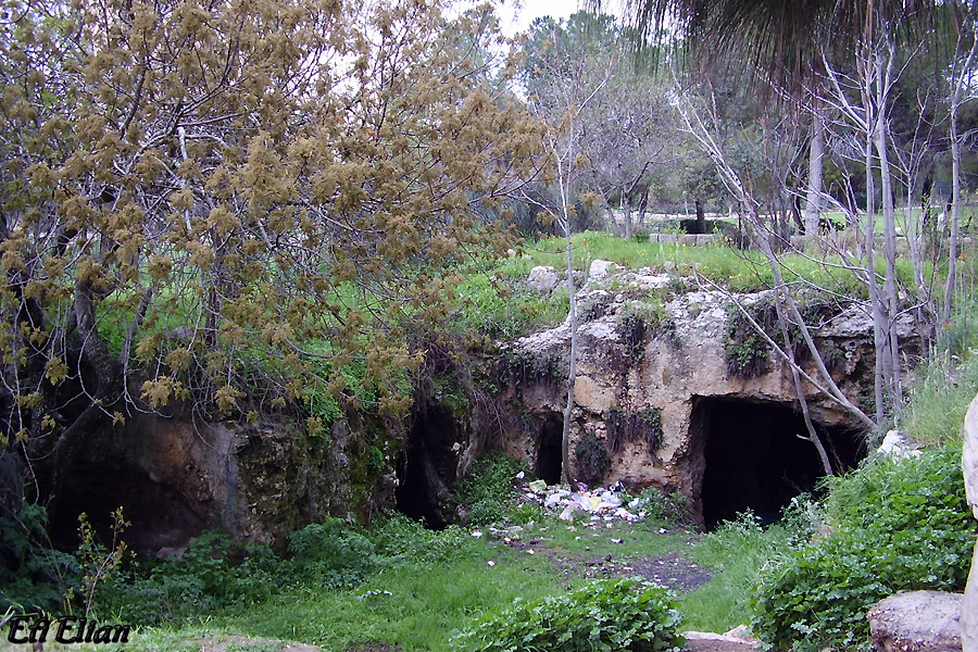 מערת האריה בסמוך לבית הקברות ממילא בירושלים